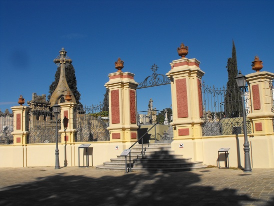 Entrée cimetière moderniste Lloret de Mar - Catalogne - Espagne